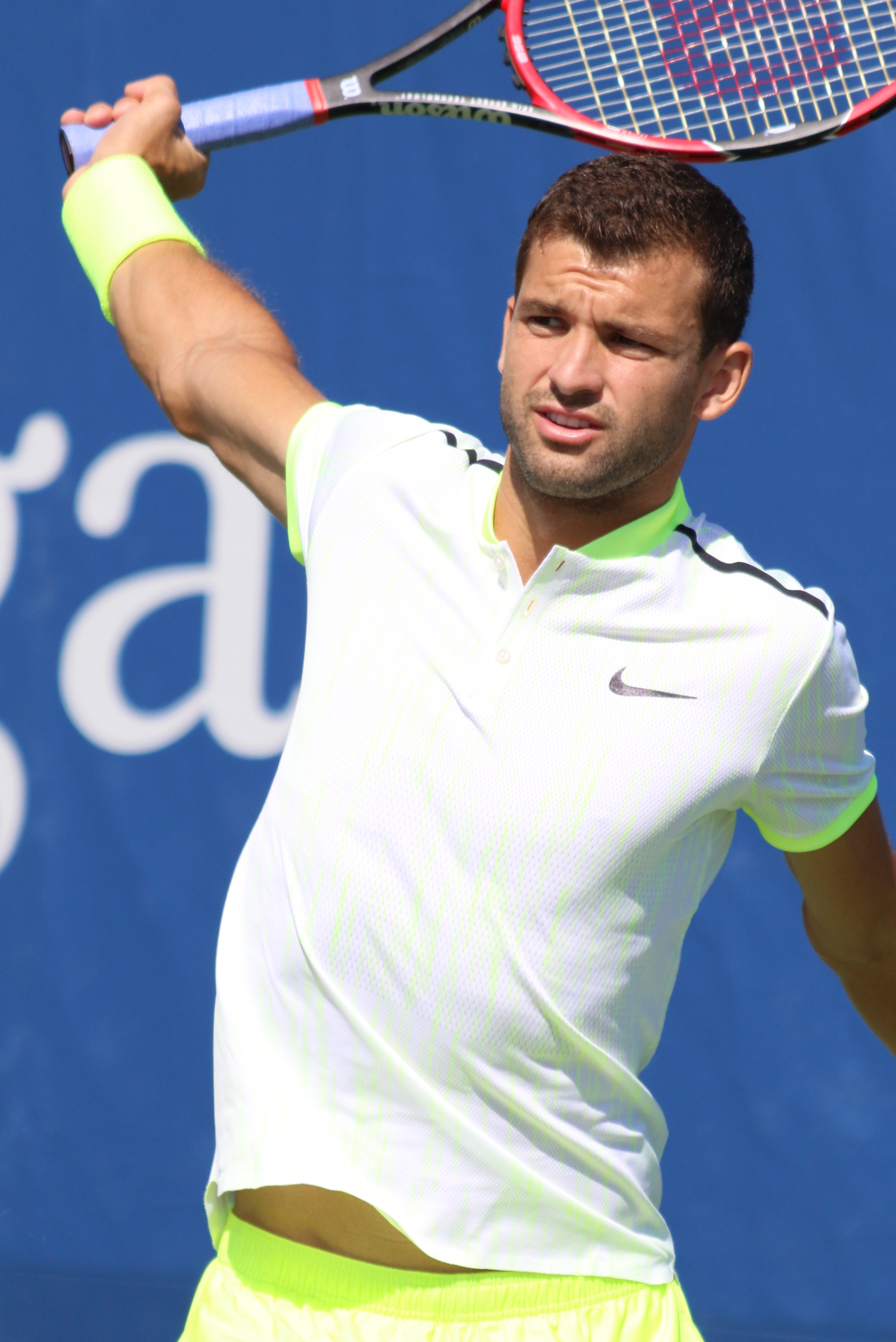 Dimitrov US16 (98)